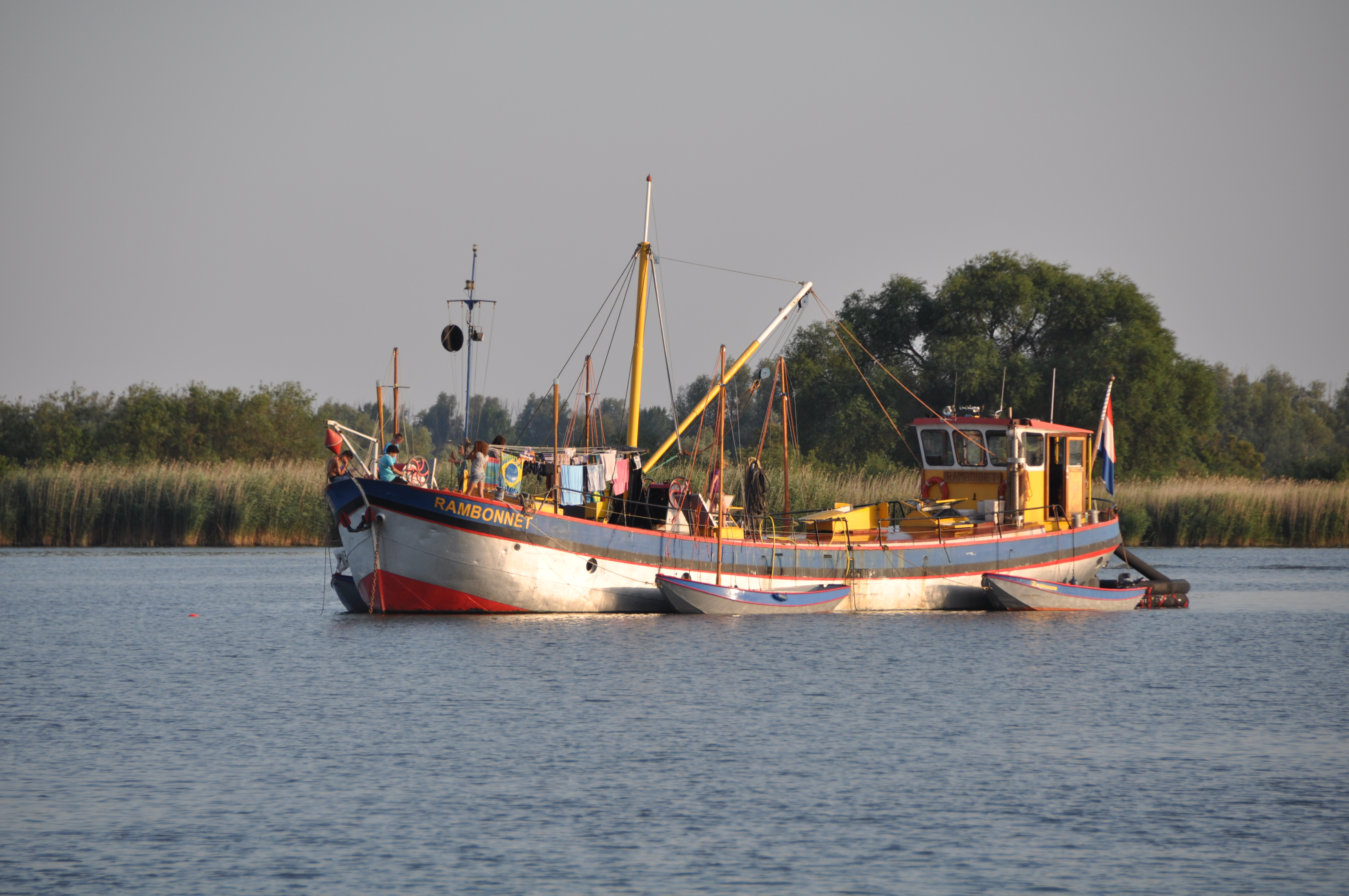 De RAMBONNET op kamp in de Brabantse Biesbosch.